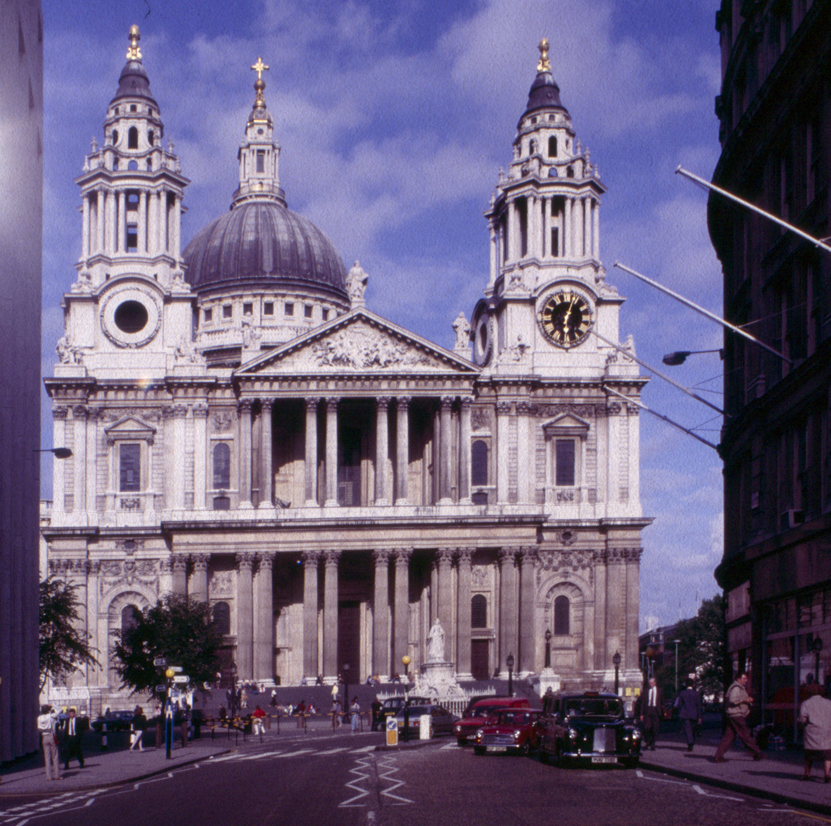 Mai 1985 in London